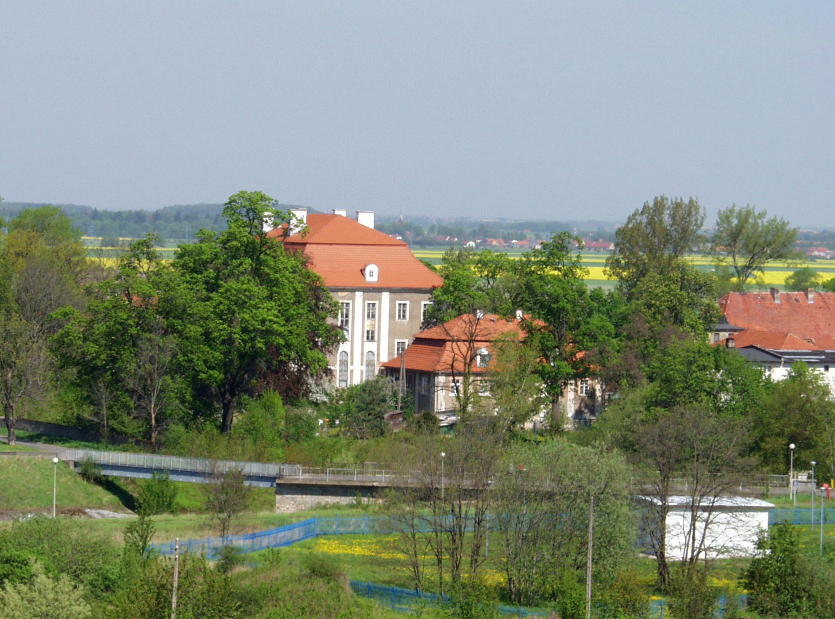 pałac w Dobromierzu